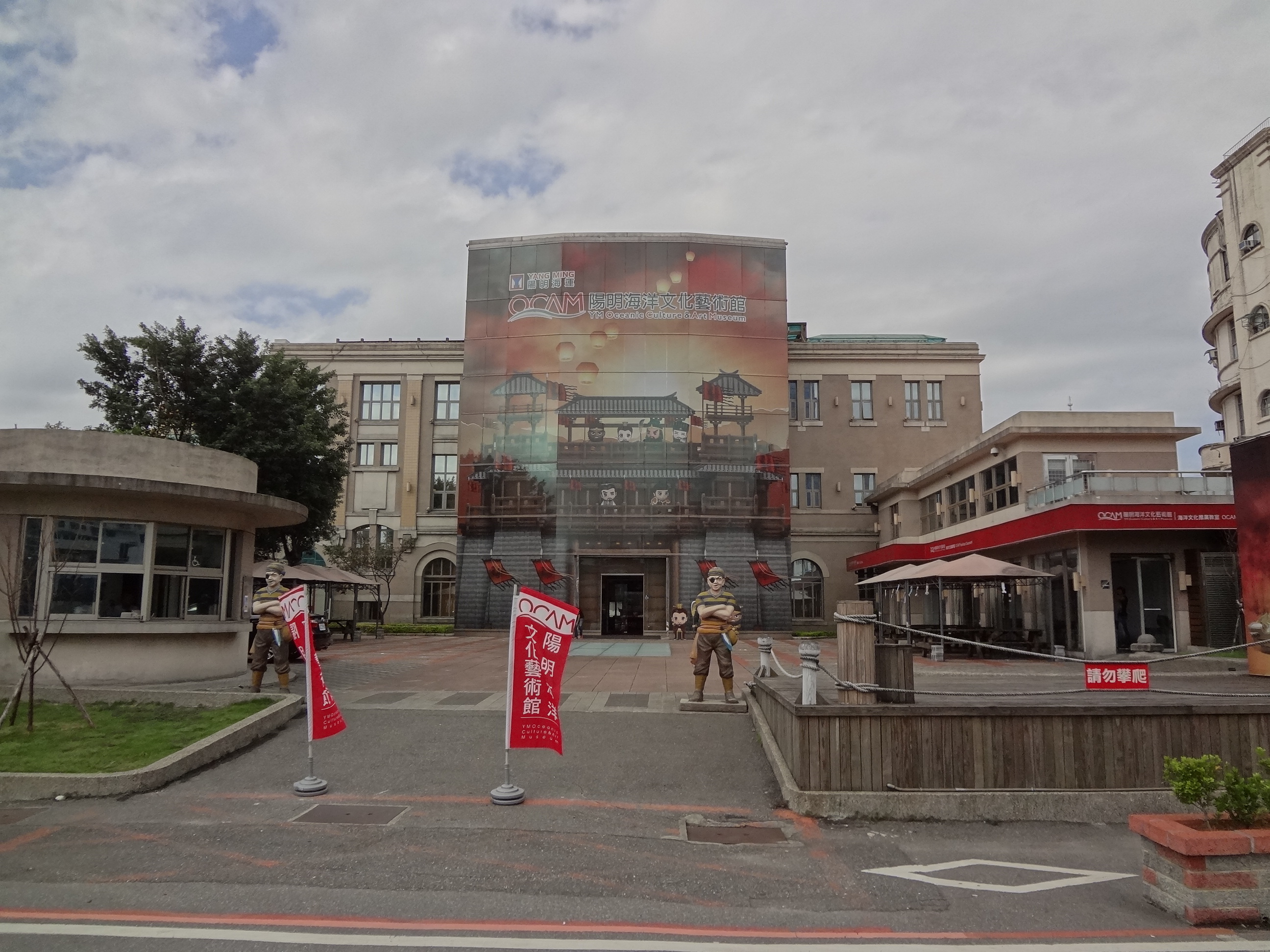 陽明海洋文化藝術館大門